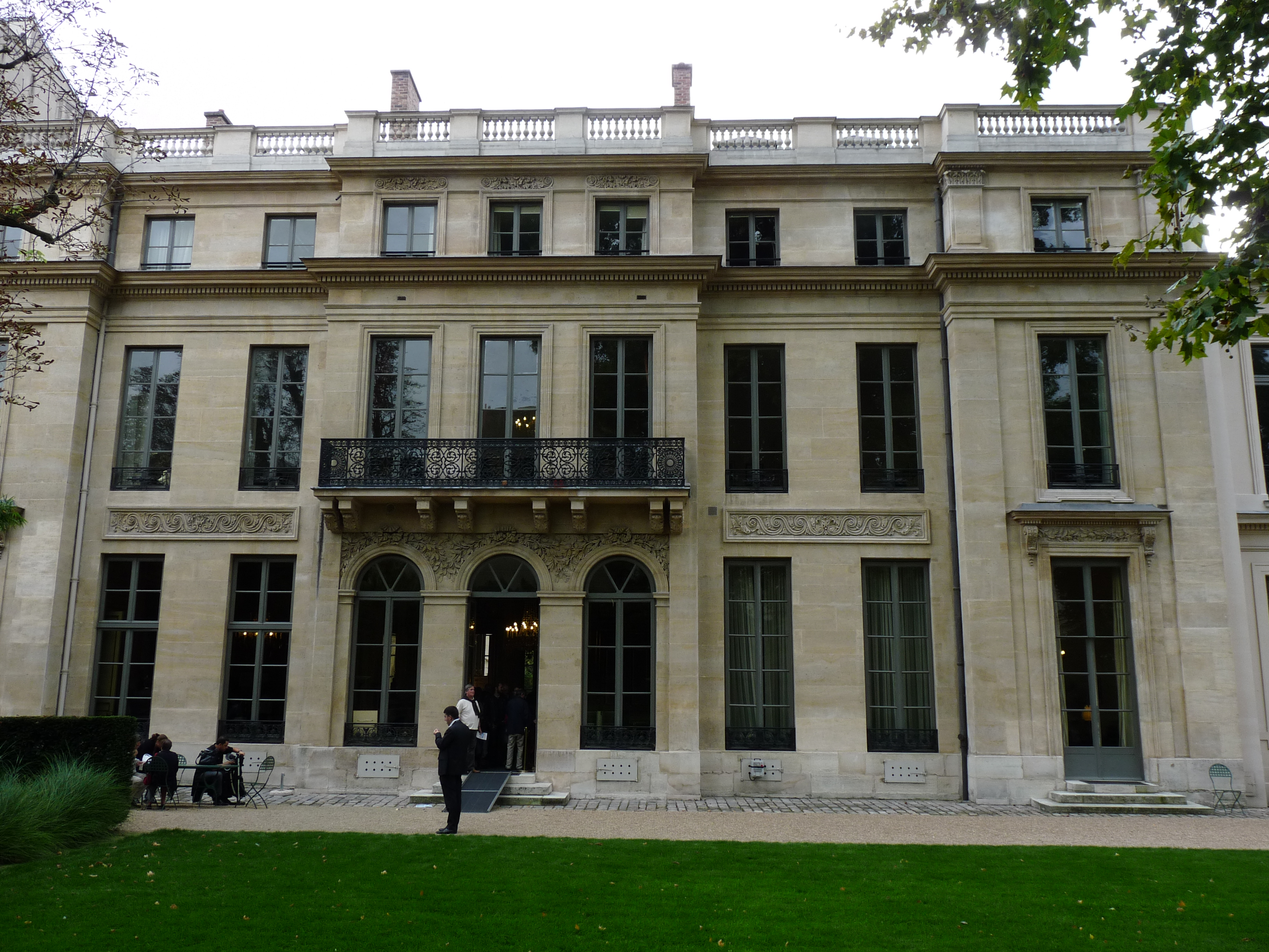 La facade côté jardin de l'hôtel de Rochechouart à Paris, siège du ministère de l'éducation nationale. Photo prise lors des journées du patrimoine 2011.